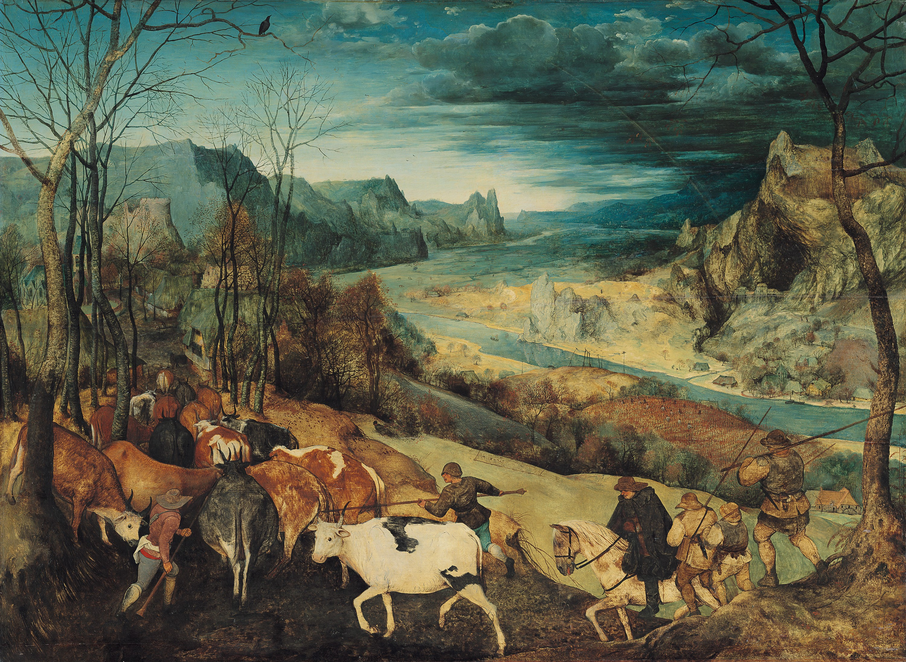 Zyklus der Monatsbilder, Szene: Heimkehr der Herde (Monat Oktober oder November)